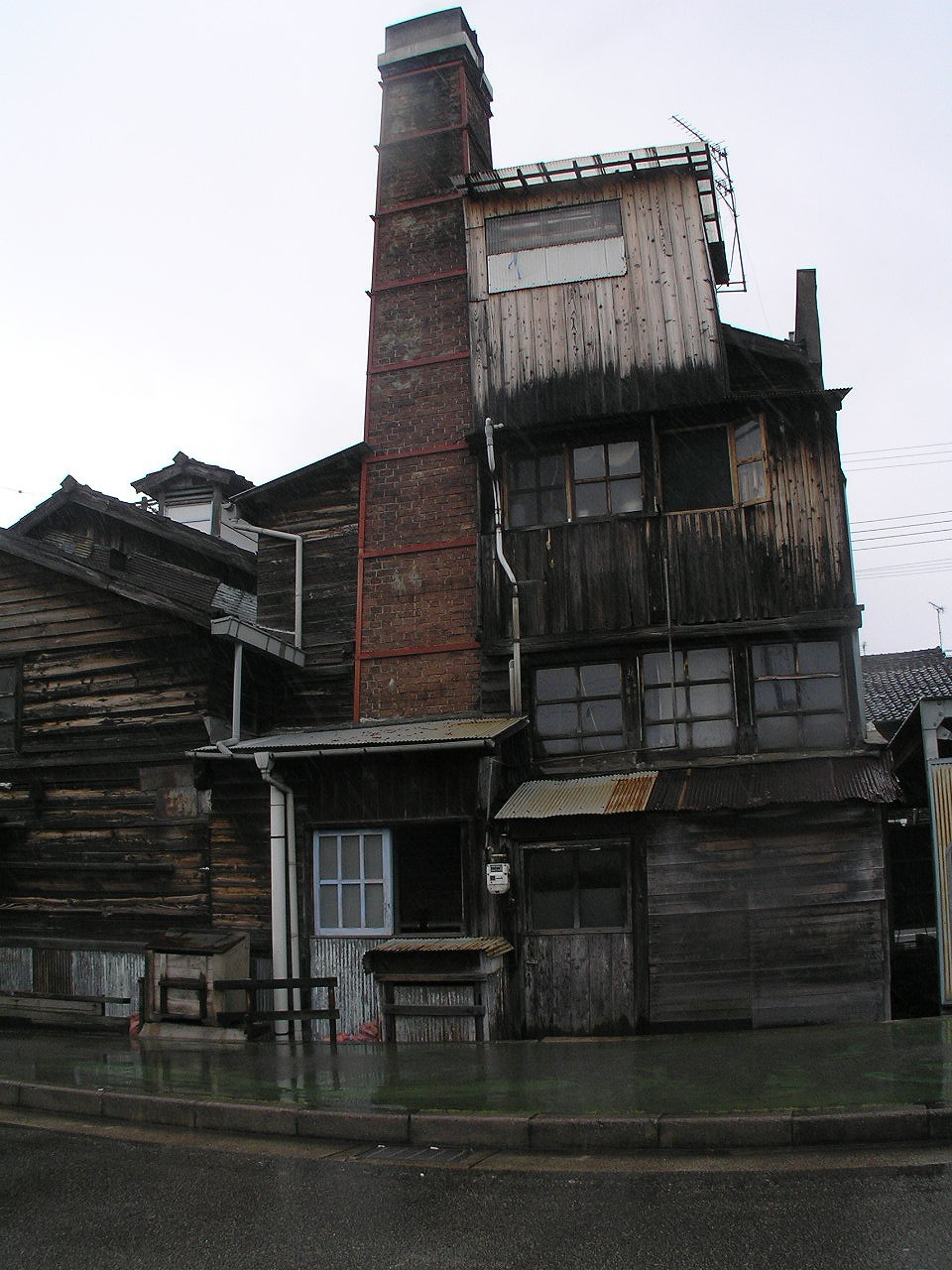 梅ヶ枝湯、煙突